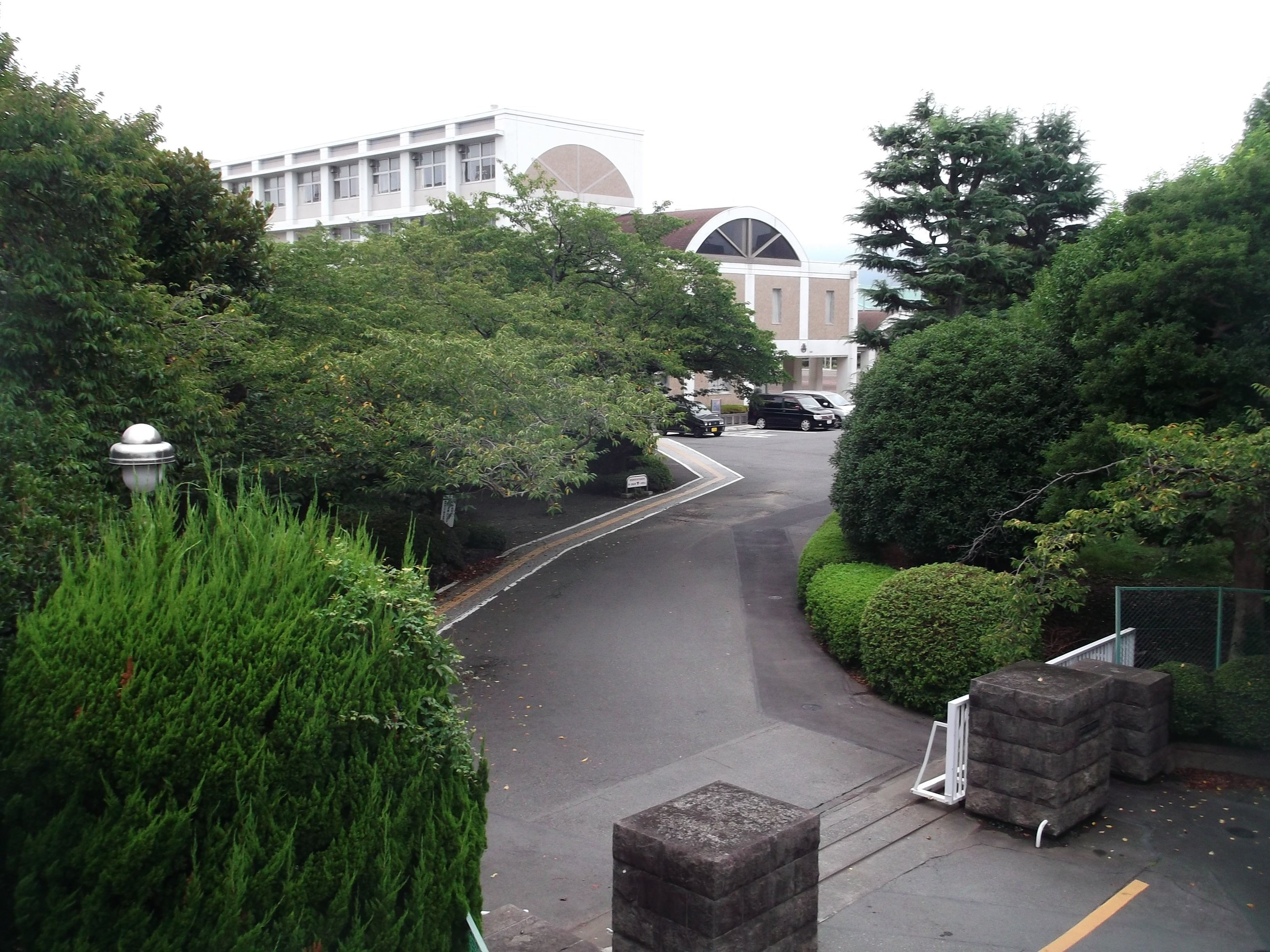 静岡県立三島北高等学校